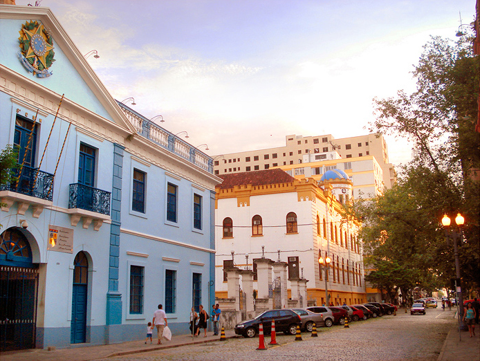 Rua da Praia, Porto Alegre. Trecho próximo à sua terminação oeste, vendo-se os prédios históricos dos quartéis do Comando Militar do Sul.